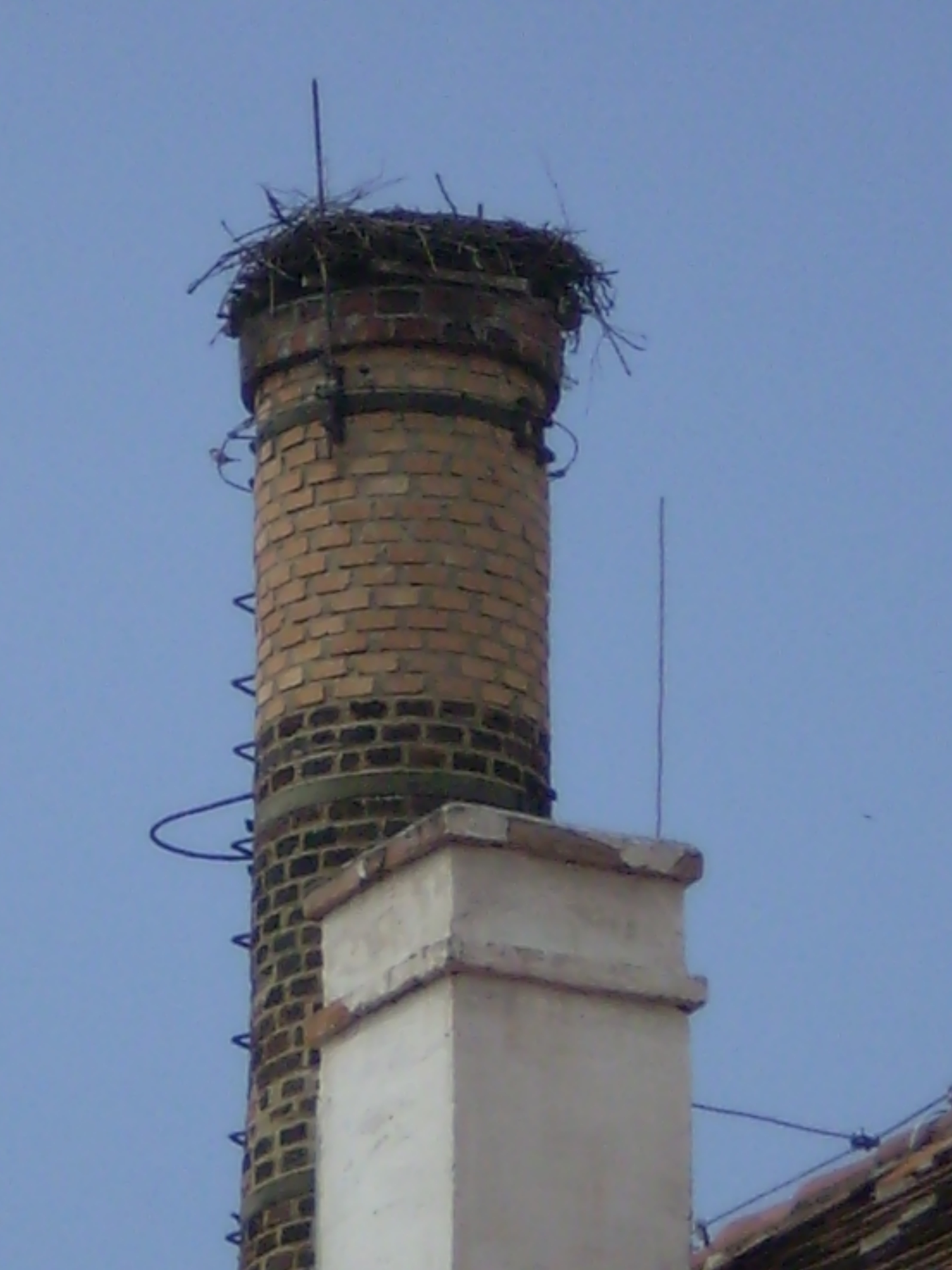 Pivovar Dalešice na Třebíčsku. Komín, který se nyní nachází na budově muzea. Právě na něm se odehrávala scéna z filmu Postřižiny. V současnosti (tj. počátek května 2008) je na něm hnízdo i s čápy.